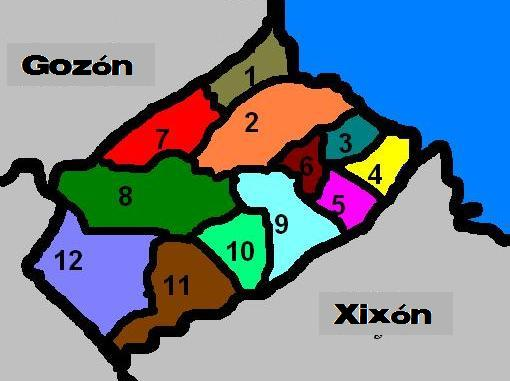 Mapa de parroquies de Carreño